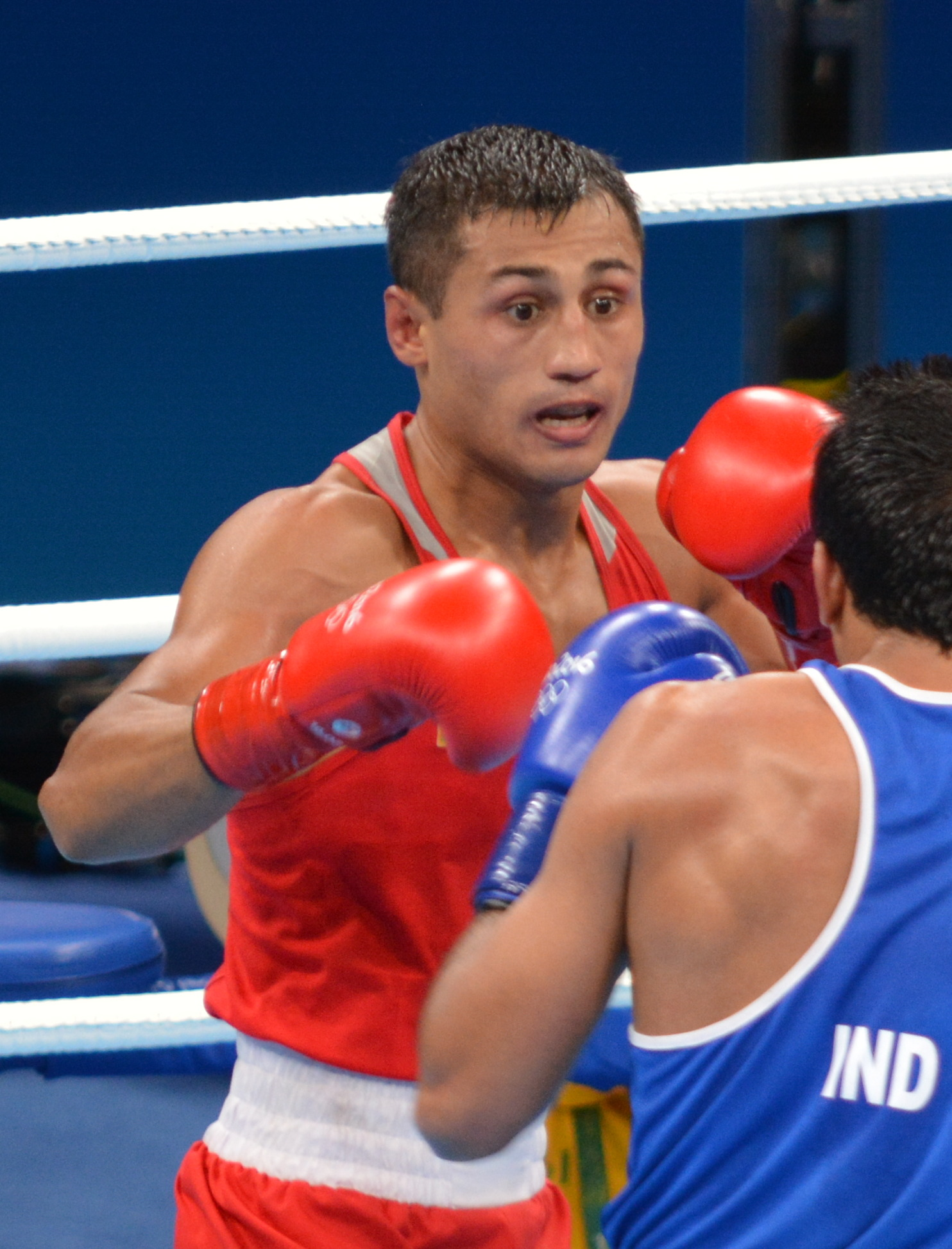 Boxe 64kg India vs Uzbequistão